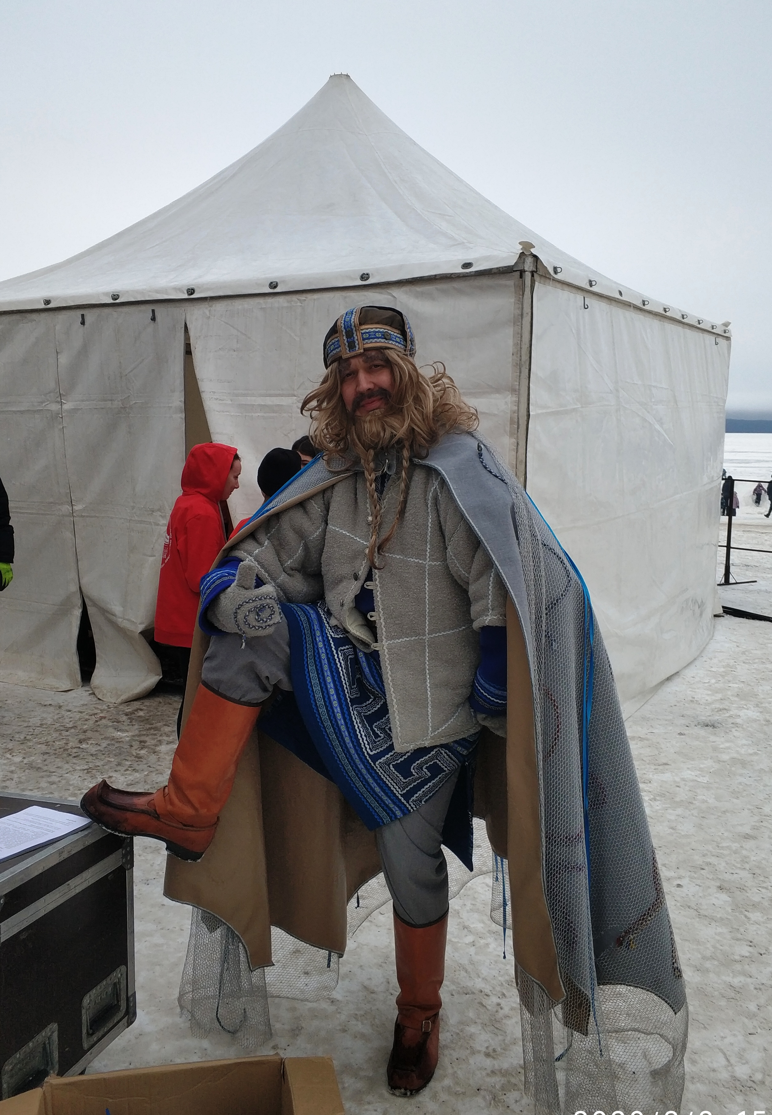 Зимний фестиваль «Гиперборея» в Петрозаводске на Онежской набережной. Герой праздника - мифологический Борей.